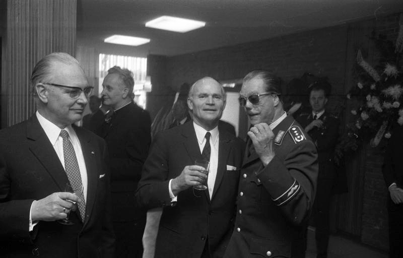 20 Jahre NATO. Bundeswehrparade auf dem Nürburgring.